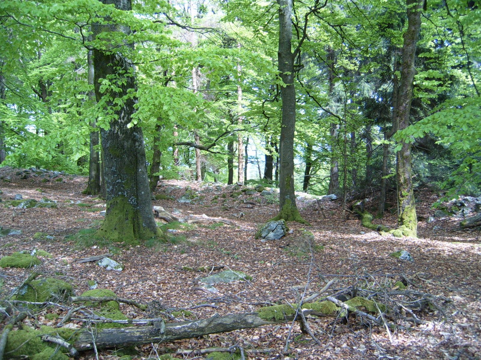 Bildbeschreibung: Ringwall * Quelle: selbst fotografiert * Fotograf: Matw